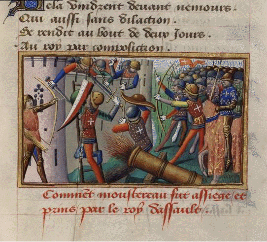 La prise de Montereau, par Martial d'Auvergne, enluminure issue de l'ouvrage Vigiles de Charles VII, Paris, France, XV°siècle.